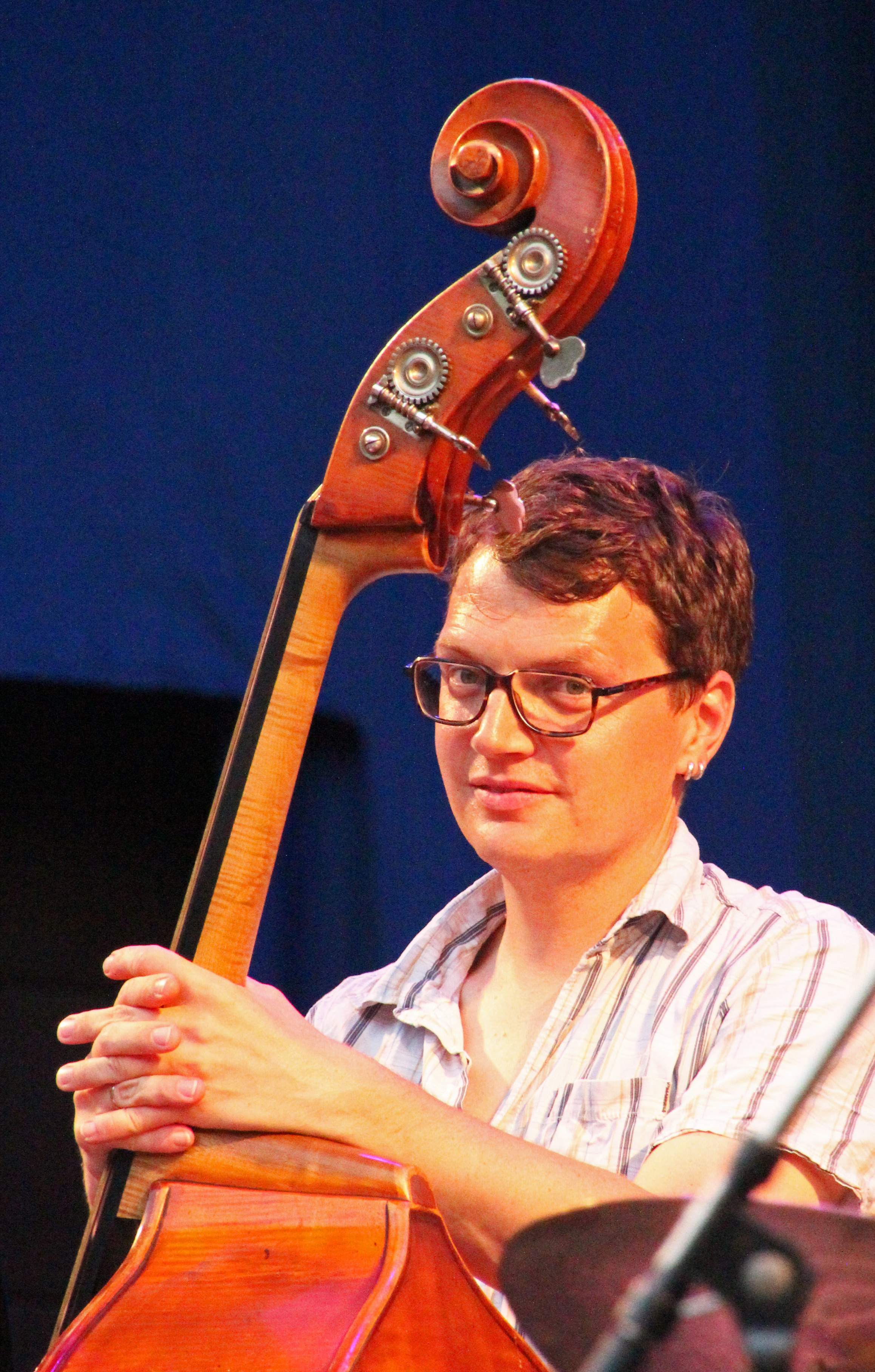 Bildinhalt: Der Bassist Arne Huber bei einem Auftritt des Christoph-Stiefel-Septetts im Palmengarten Aufnahmeort: Frankfurt am Main, Deutschland Die dargestellte Person wurde bei einem öffentlichen Auftritt fotografiert.